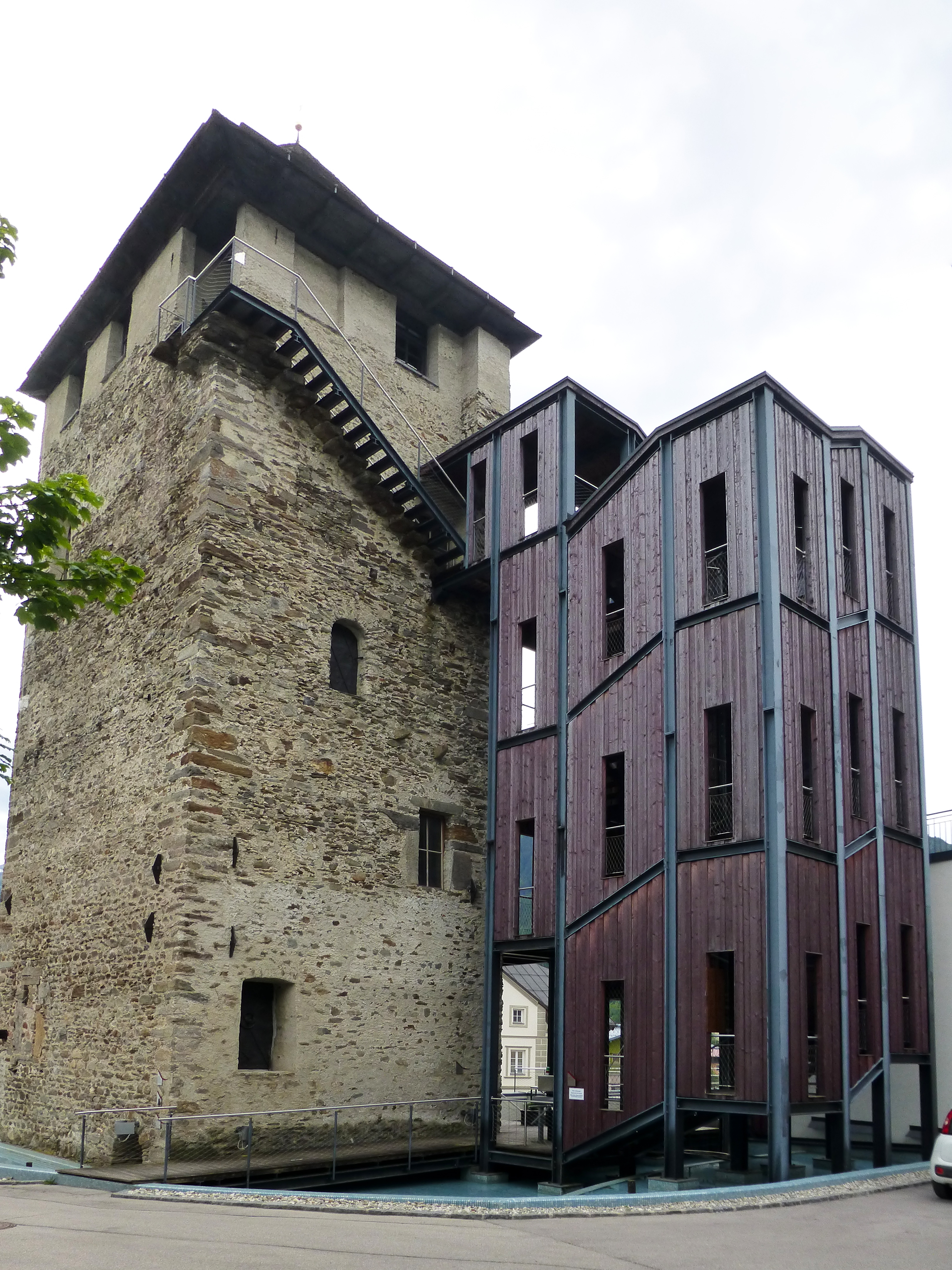 Mautturm Winklern; Ansicht von Norden mit dem angebauten Treppenaufgang